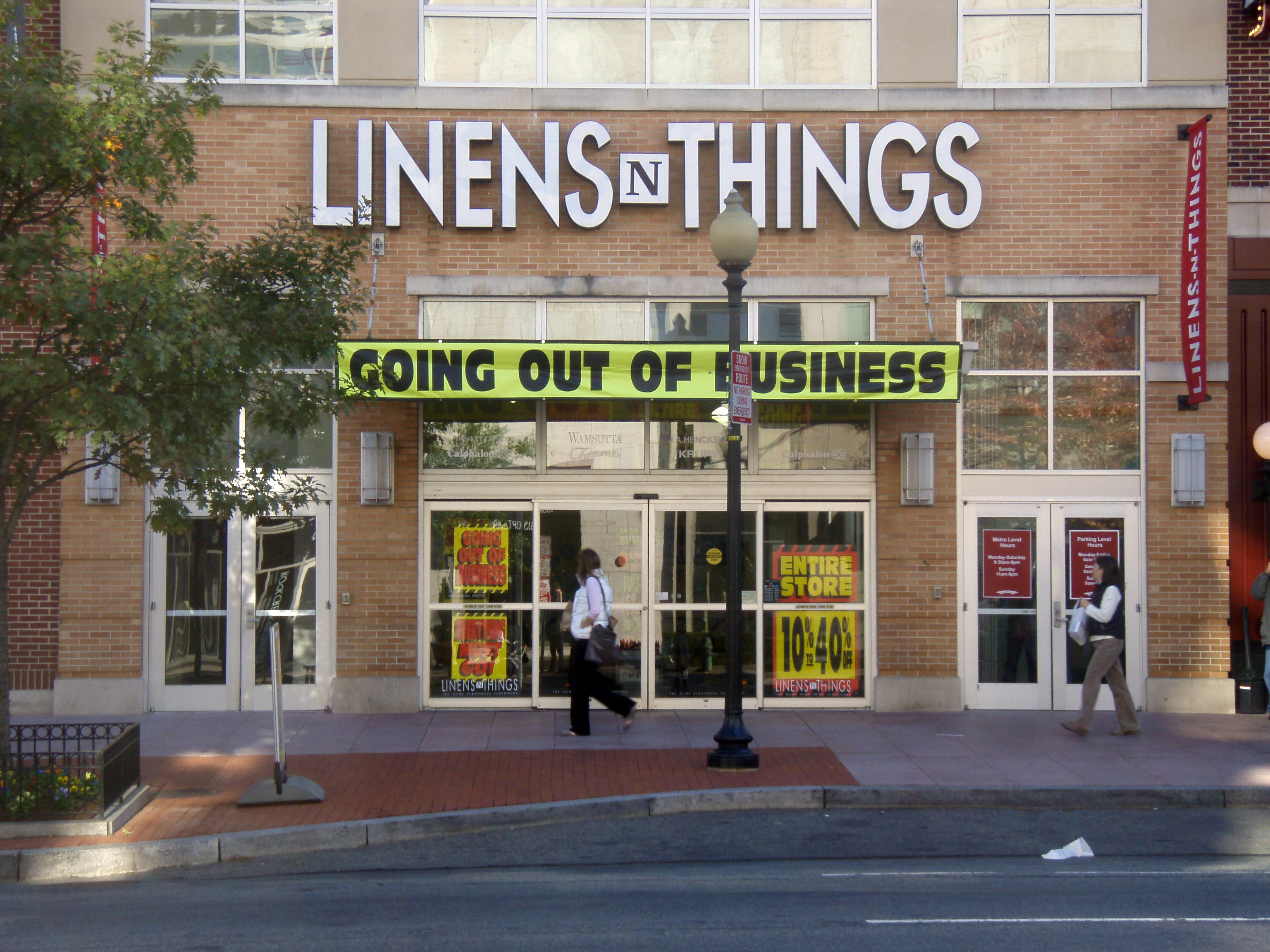 Bankrupt shop, signes.